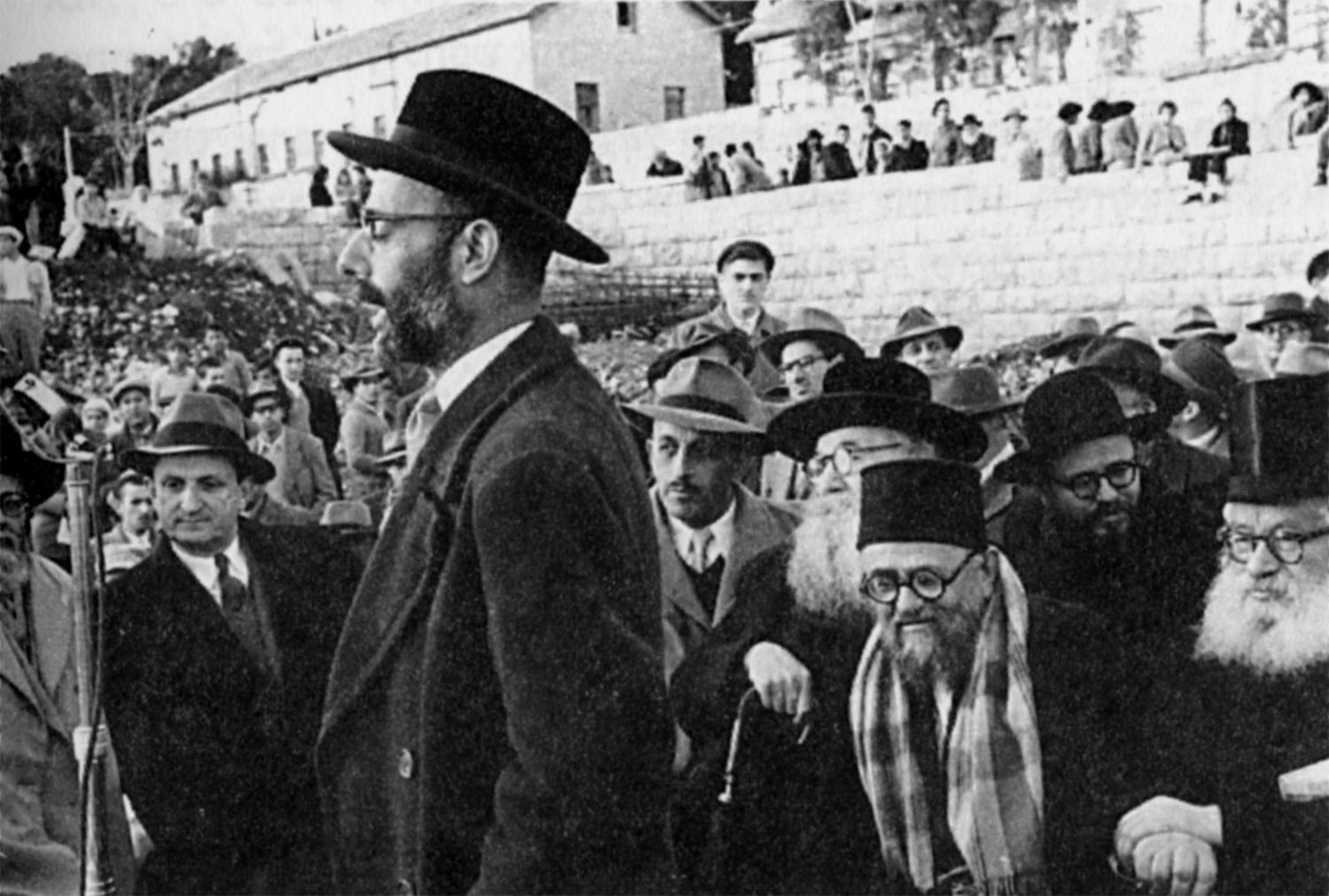 מימין לשמאל, הרבנים: יצחק הרצוג, אליעזר יהודה וולדנברג, עזרא עטיה, זלמן סורוצקין ויהודה צדקה (נואם). משמאל: הרב יצחק נסים.